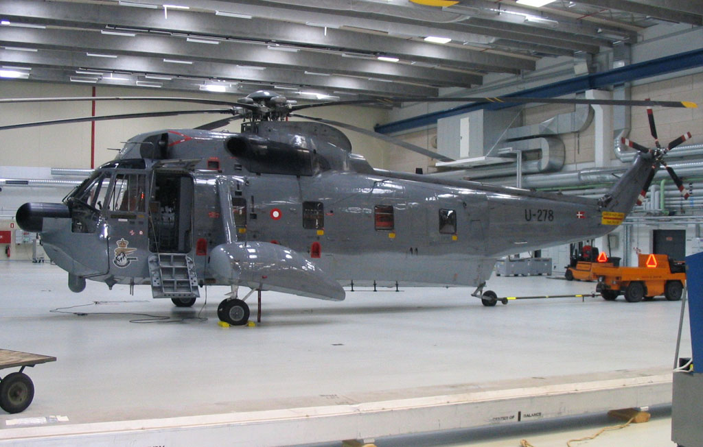 Sikorsky S-61A - Flyvestation Karup - 2004 Sikorsky S-61A - Air Force Base Karup, Denmark - 2004